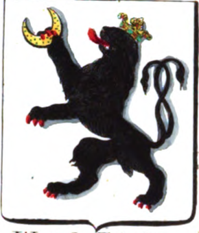 D'argent au lion de sable, couronné, armé et lampassé d'or, tenant de la patte dextre en chef un croissant d'or.